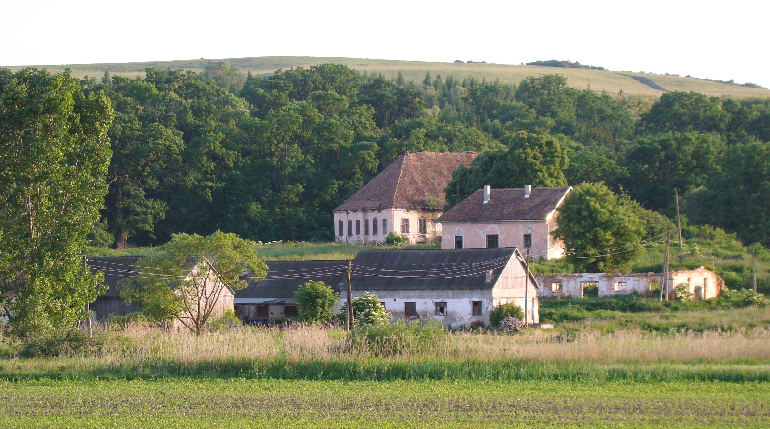 Castelul Somsics din Chendu Mare, comuna Bălăușeri, judeţul Mureş